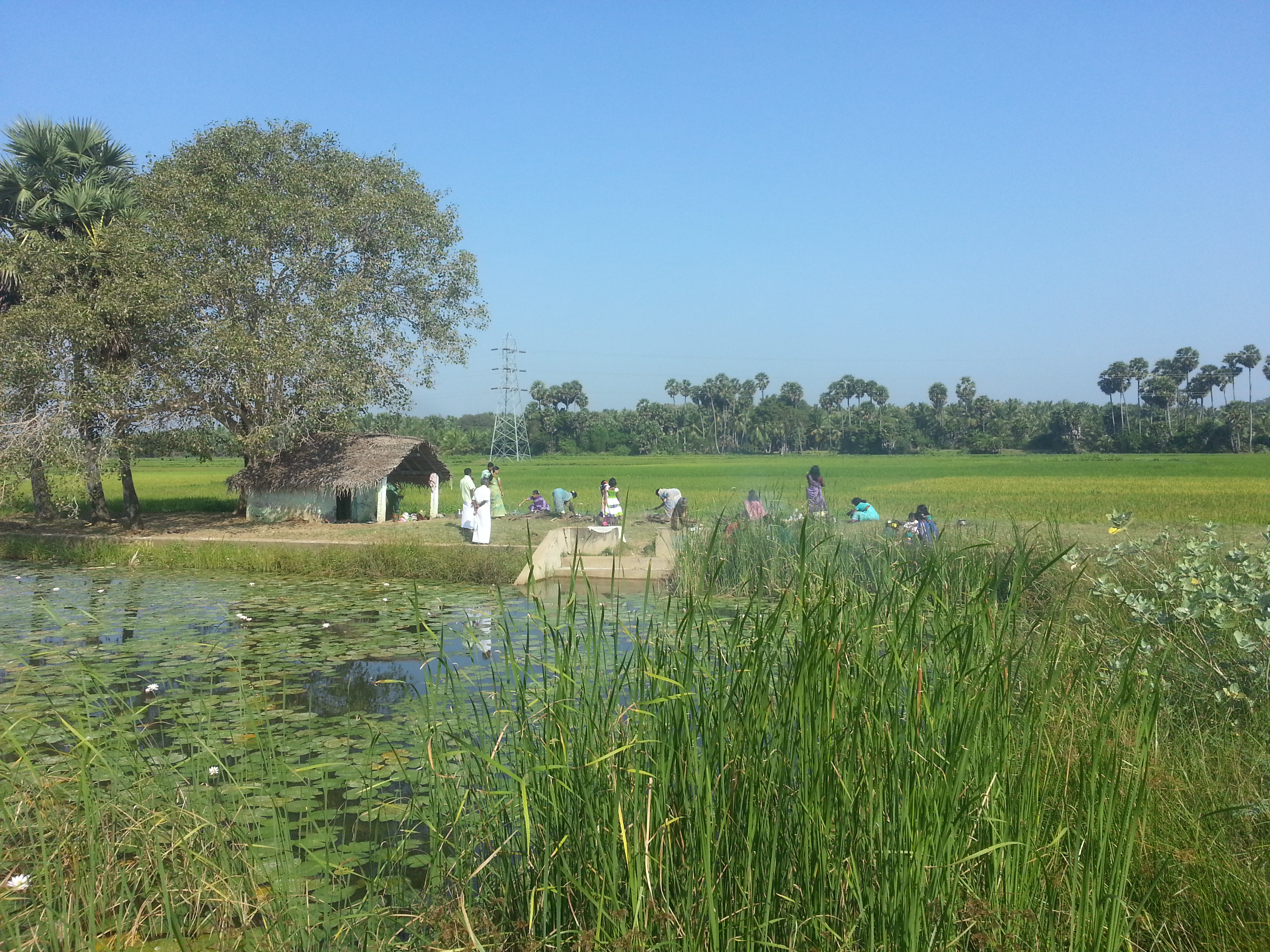 முடச்சிக்காடு அருள்மிகு சிவலிங்க சித்தி விநாயகர் கோயில், முடச்சிக்காடு